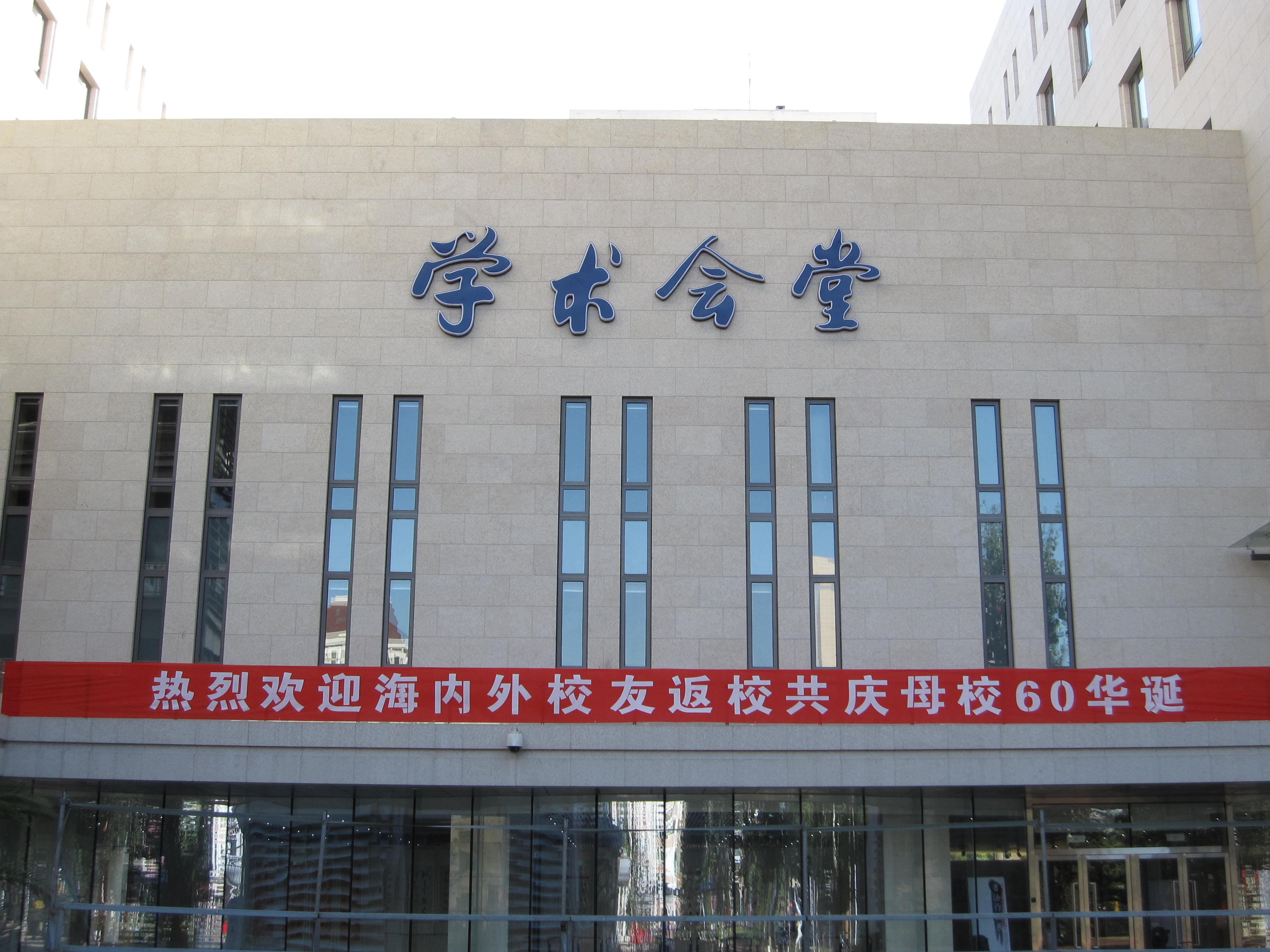 中文（中国大陆）: 中央财经大学新综合楼